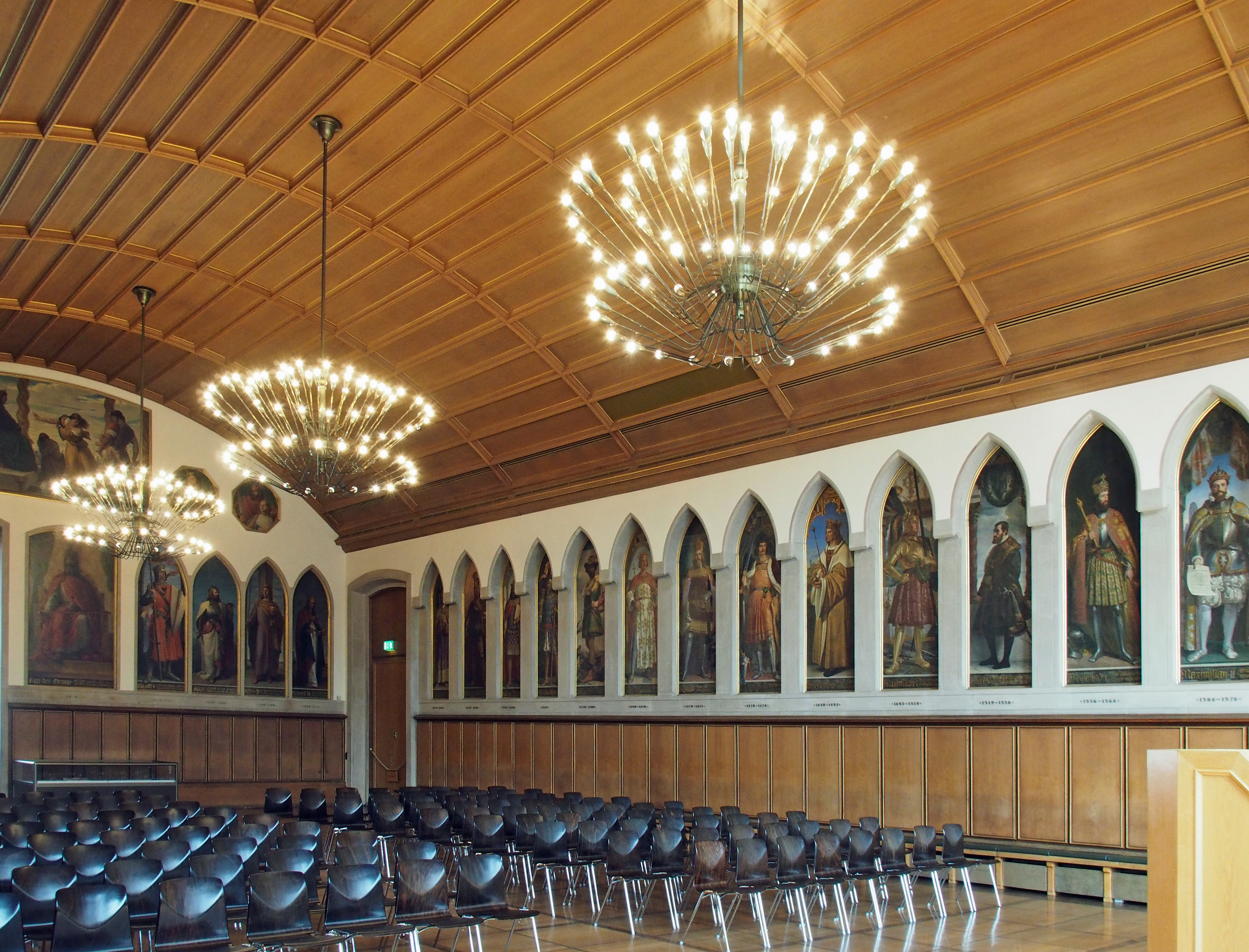 Kaisersaal im „Haus zum Römer“ (Rathaus), Frankfurt am Main